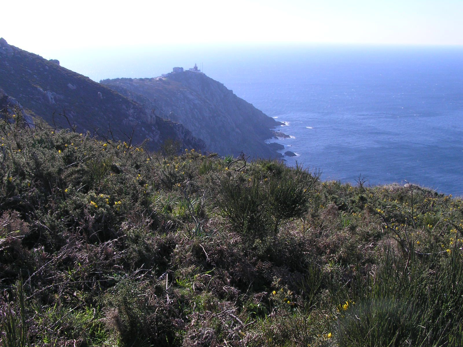 Vista do Cabo Fisterra en febreiro. O Cabo Fisterra está situado na provincia de Coruña, na Galiza (España).